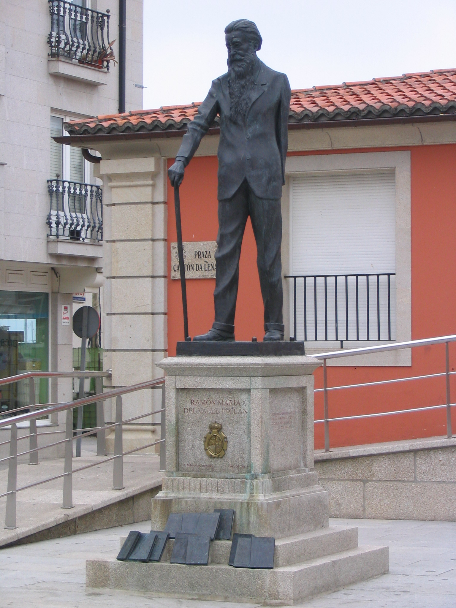 Monument to Valle-Inclan by Gonzalo Sanchez Mendizabal, A Pobra do Caramiñal, Spain